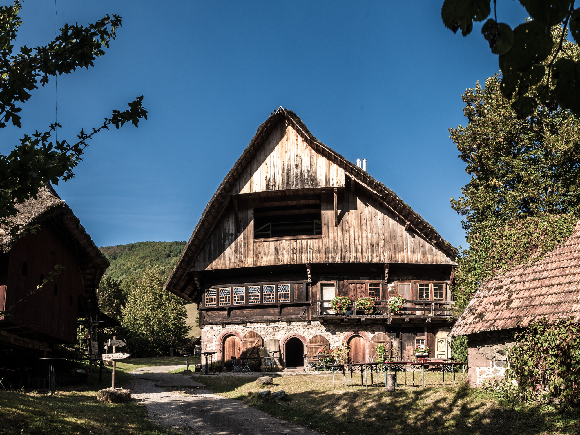 Klausenbauernhof in Wolfach (Panorama gestitcht)